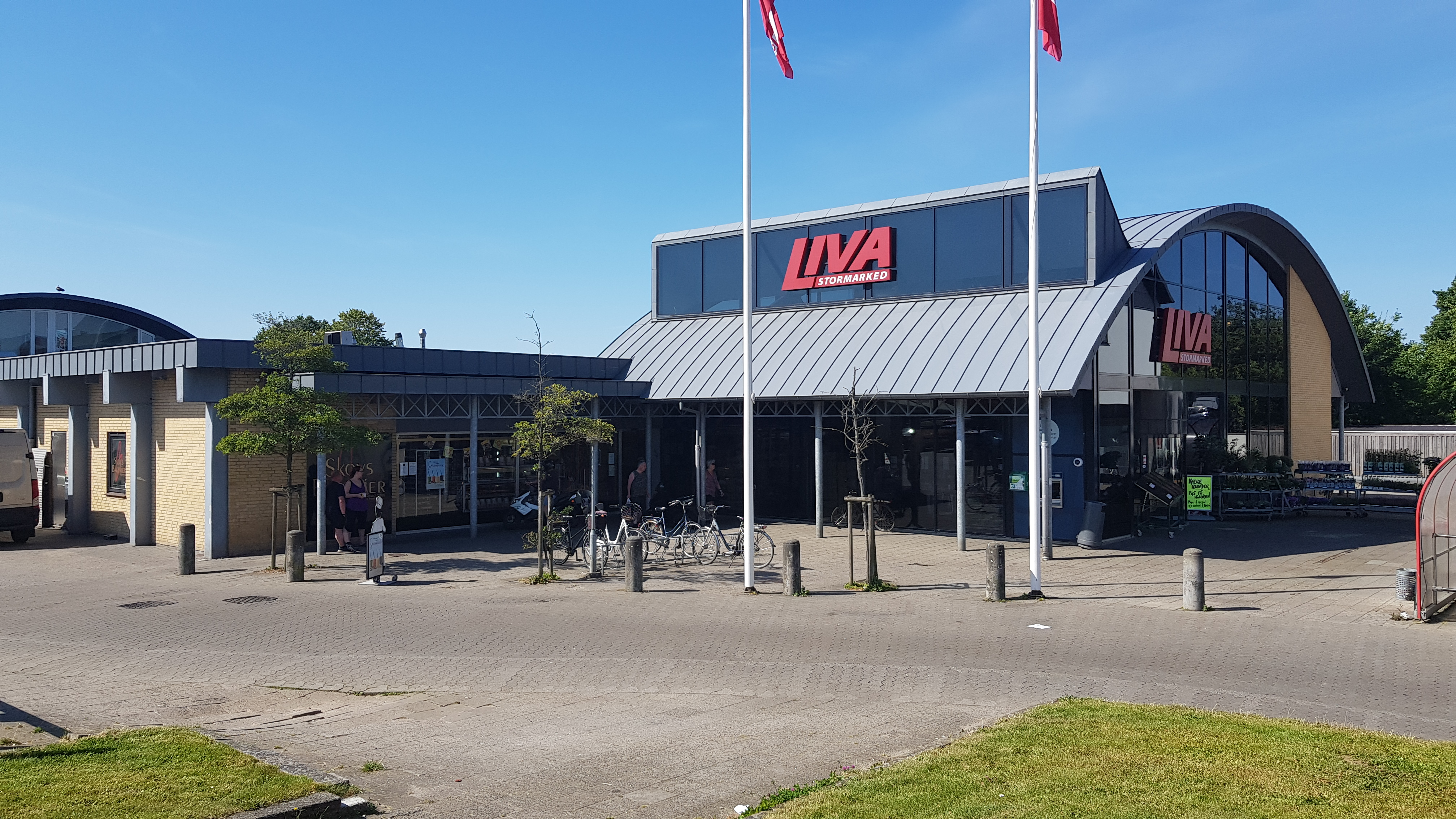 Nordlige ende af Liva Stormarked på Galgebjergvej i Kolding